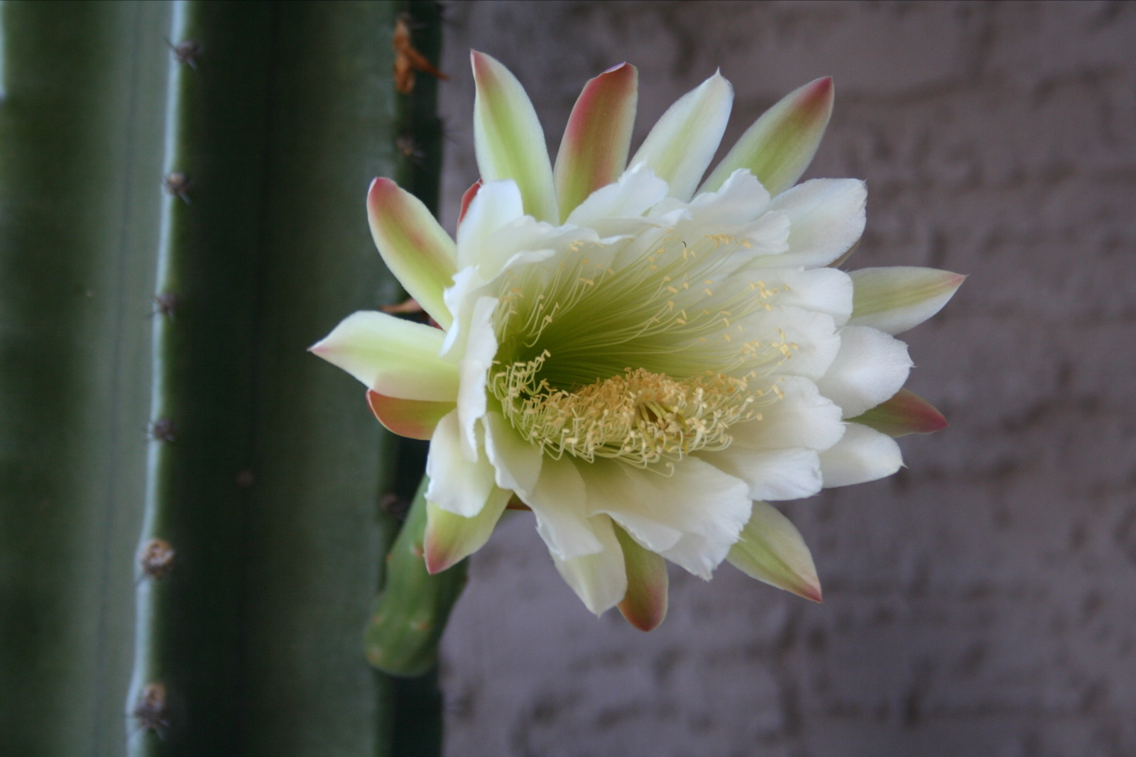 Cereus hildmannianus subsp. uruguayanus